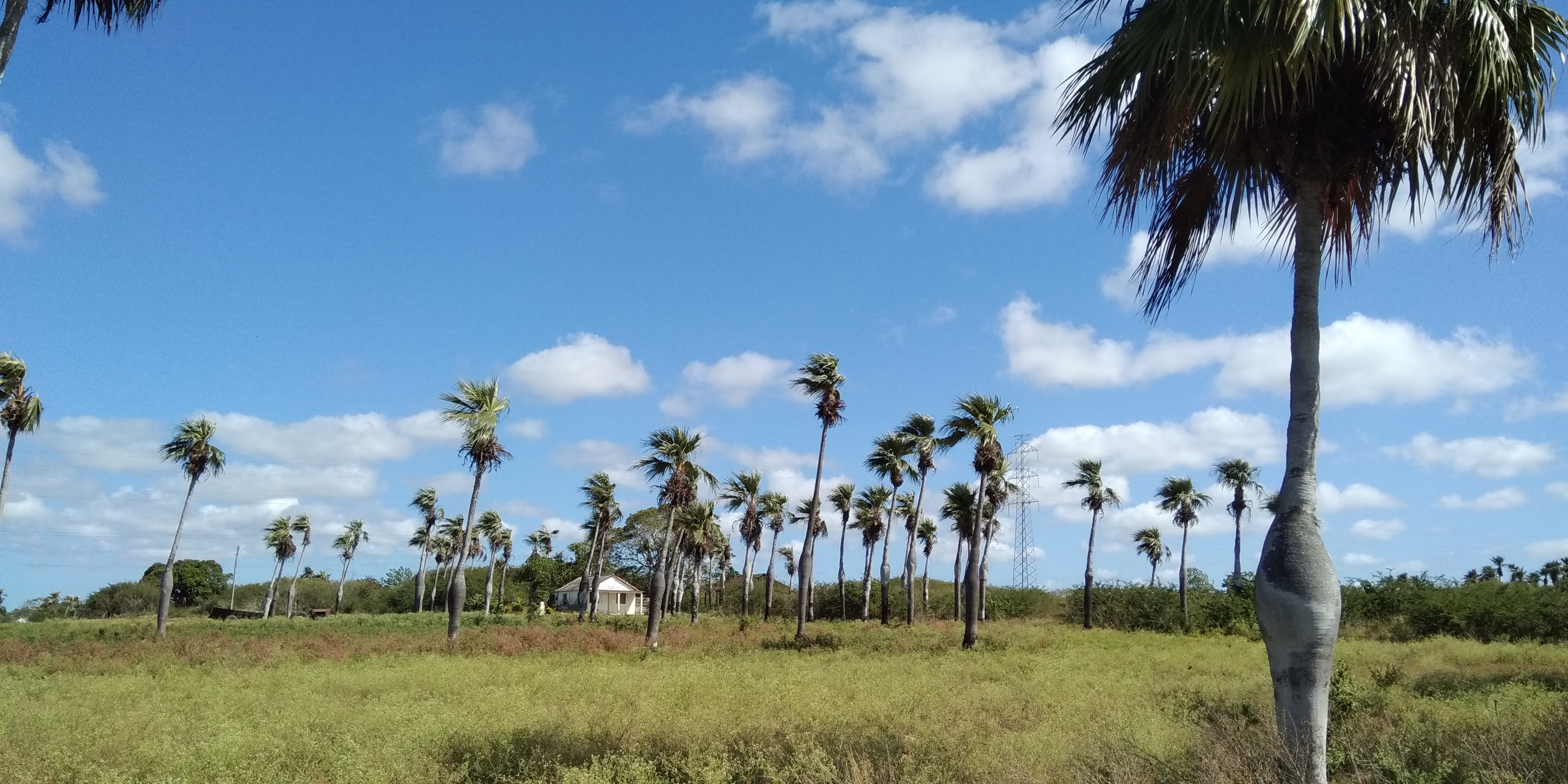 Las Barrigonas entre Herradura et Consolación del Sur